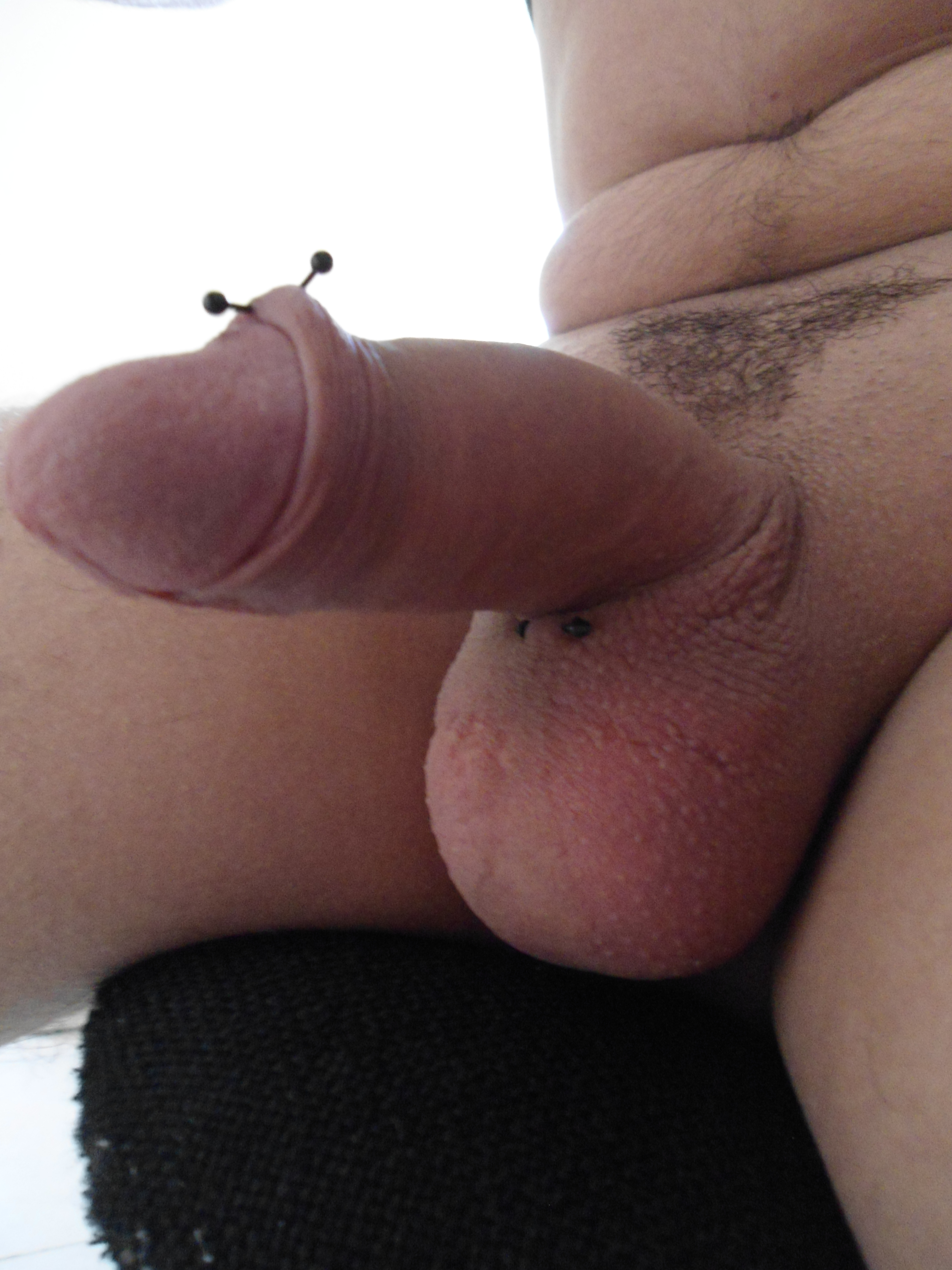 Pene con 2 Piercings